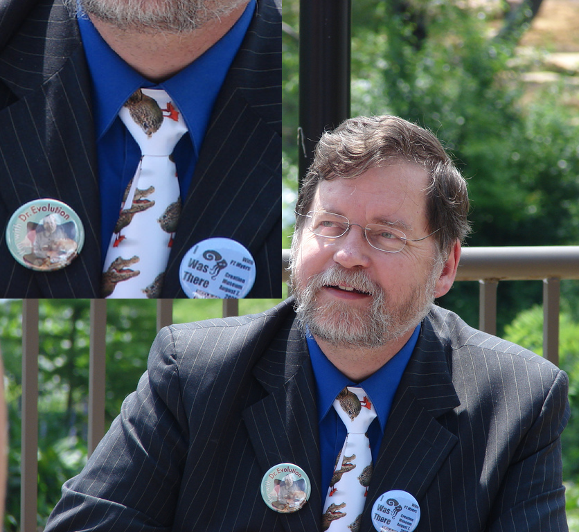 Trabalho original, acrescido zoom na gravata e realizado corte de interferência na lateral direita.